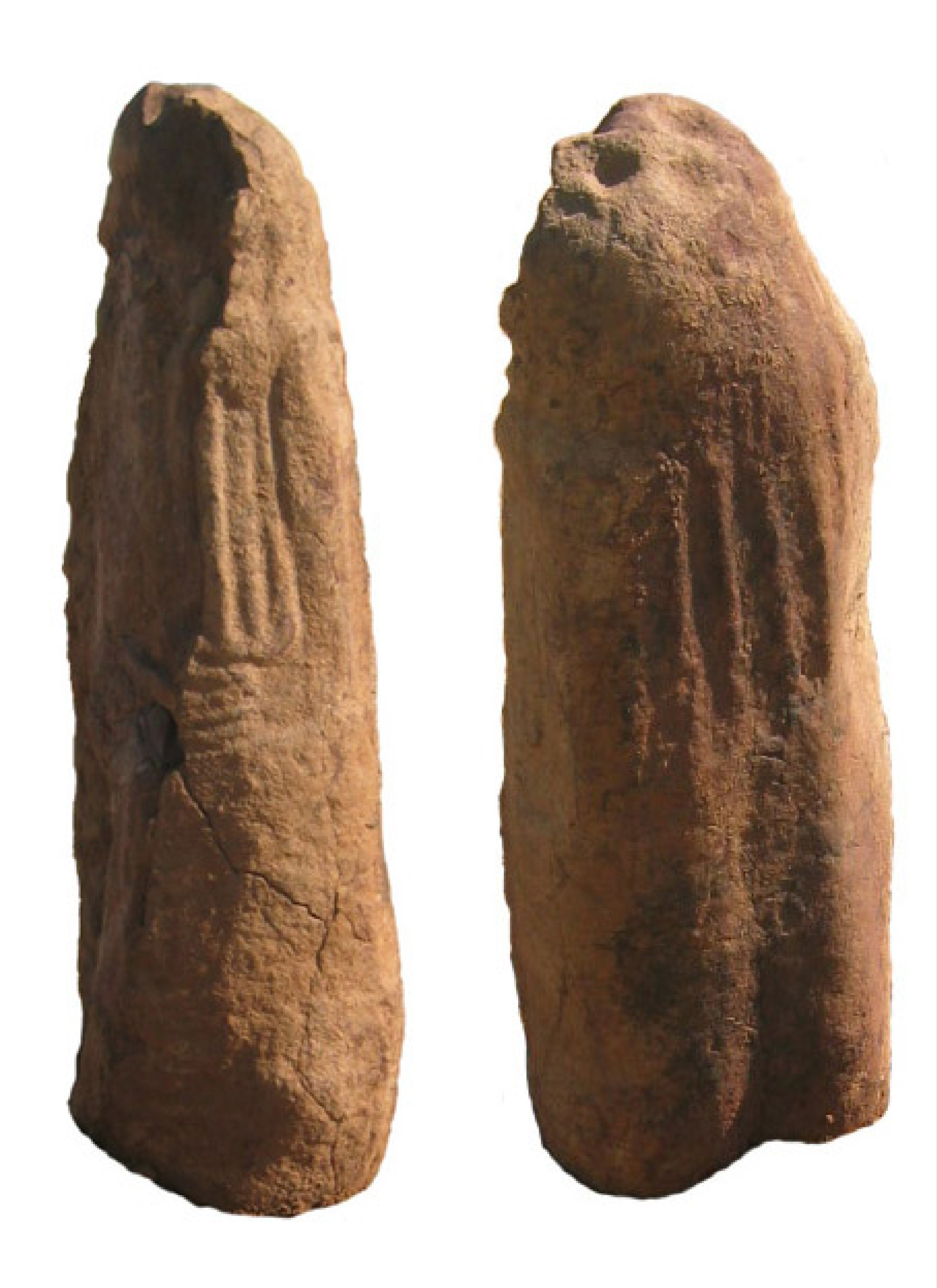 Es tracta de l'escultura d'una figura humana realitzada sobre un petit menhir de 93 cm d'alçada del que es conserven només algunes cares esculpides perquè es va trobar parcialment fragmentada. A la part frontal es veuen el braç i mà esquerra, un fragment del peu esquerra i part del que podrien ser uns tatuatges a la cara. A la part dorsal es veuen a mitja alçada unes franjes verticals del que podria ser un abric o capa i a la seva dreta un cercle que podria ser una anella o tatuatge. Si bé els diferents elements i motius representats ens remeten a les estàtues-menhir del grup de la Rouergue (França), aquesta figura presenta 4 cassoletes a sobre del cap que seria un element distintiu i propi.